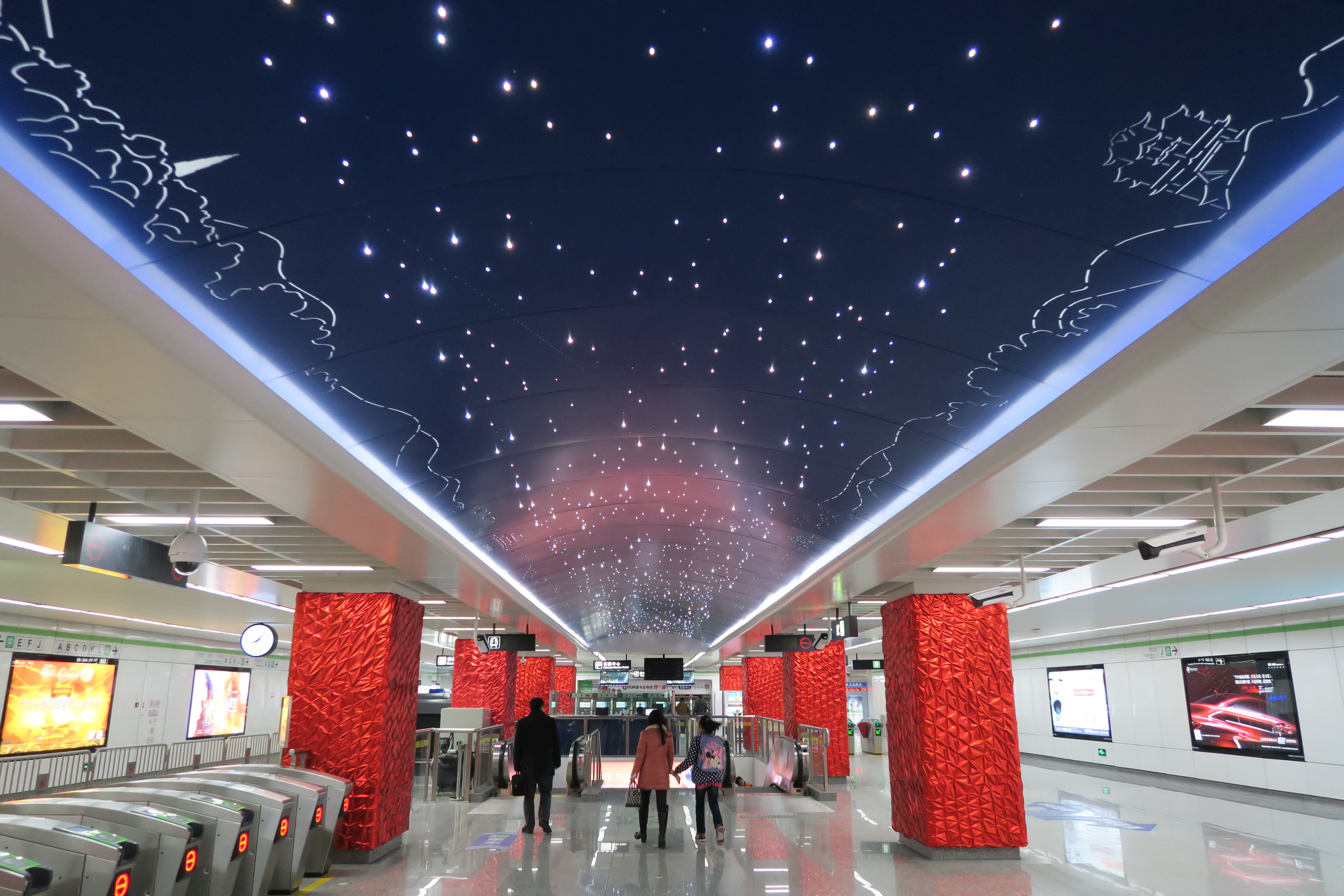 杭州地铁市民中心站